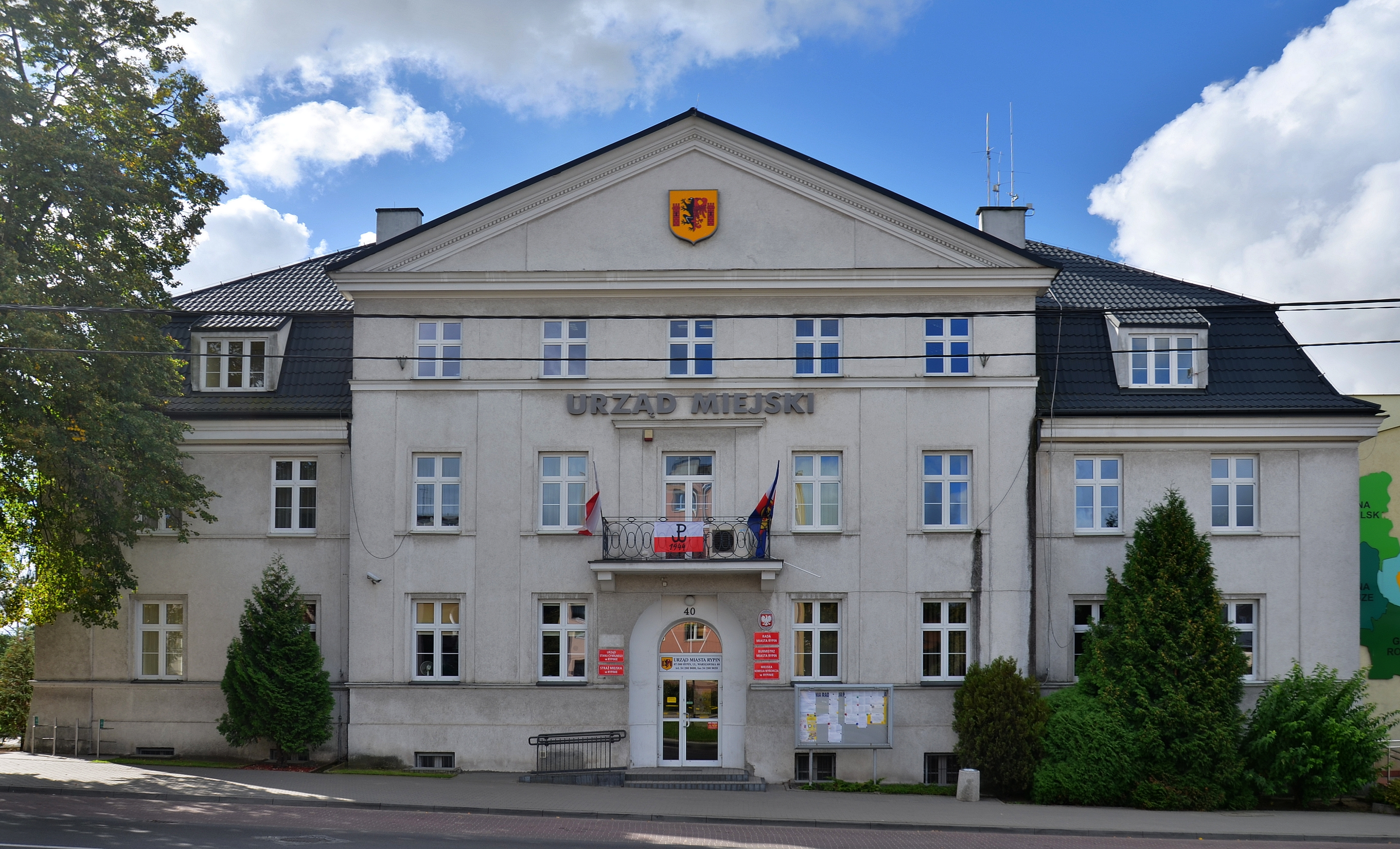 Urząd Miasta Rypin, dawny budynek starostwa, 1930 r.